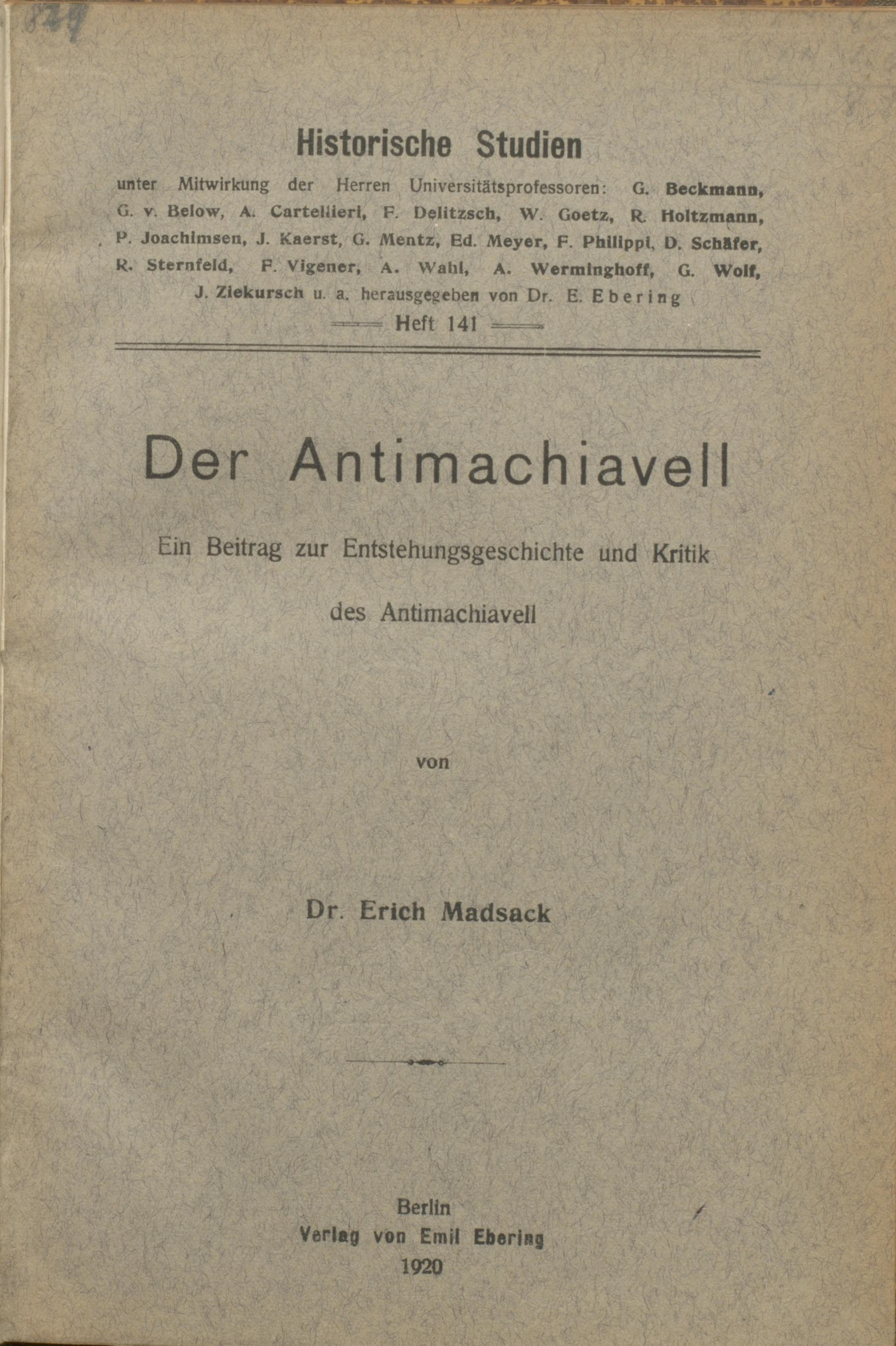 Erich Madsack Der Antimachiavell. Ein Beitrag zur Entstehungsgeschichte und Kritik des Antimachiavell. Dissertation. Berlin 1920